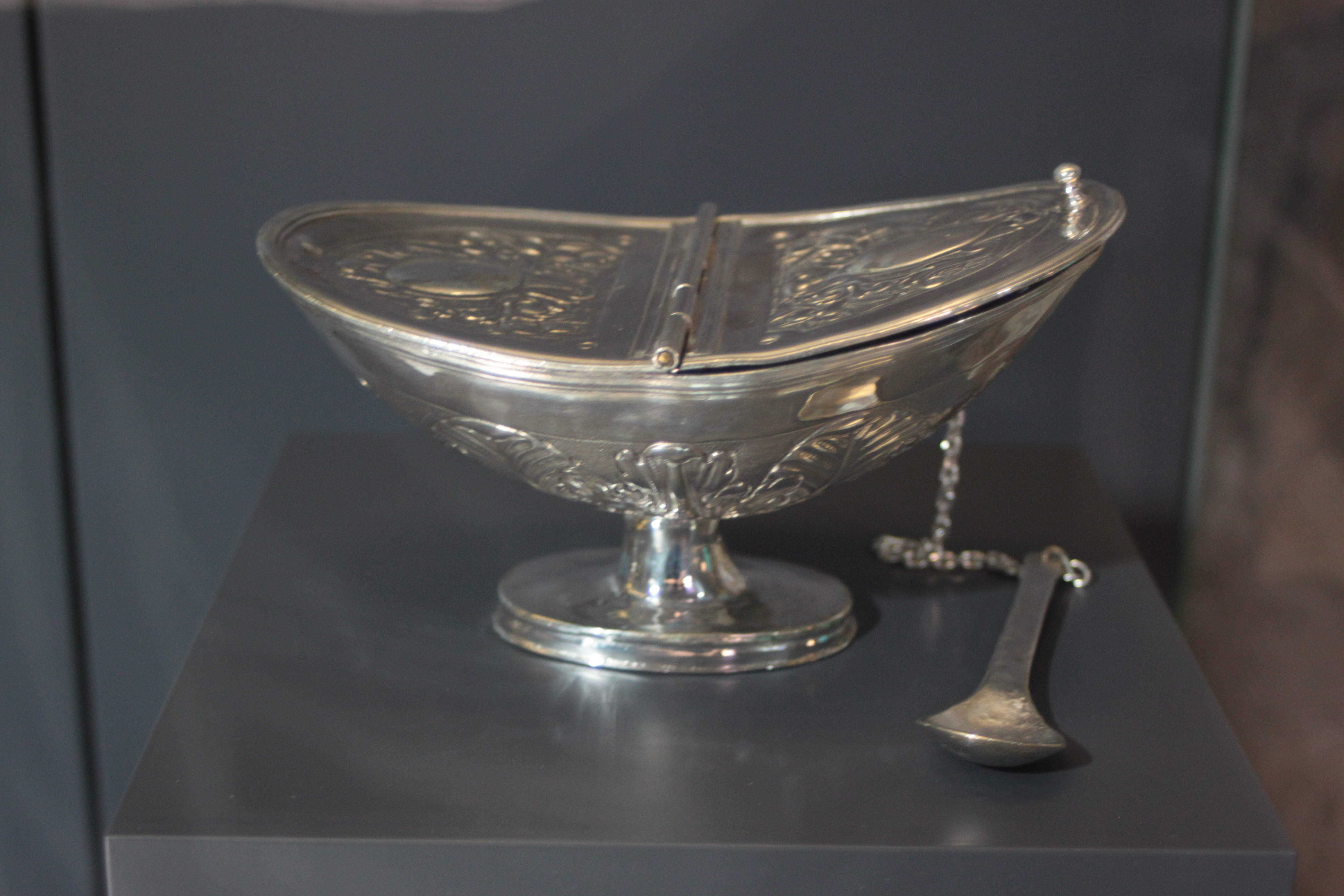 Navette (1734), Trésors, église Saint-Thuriau (1809), Fr-56-Crac'h.